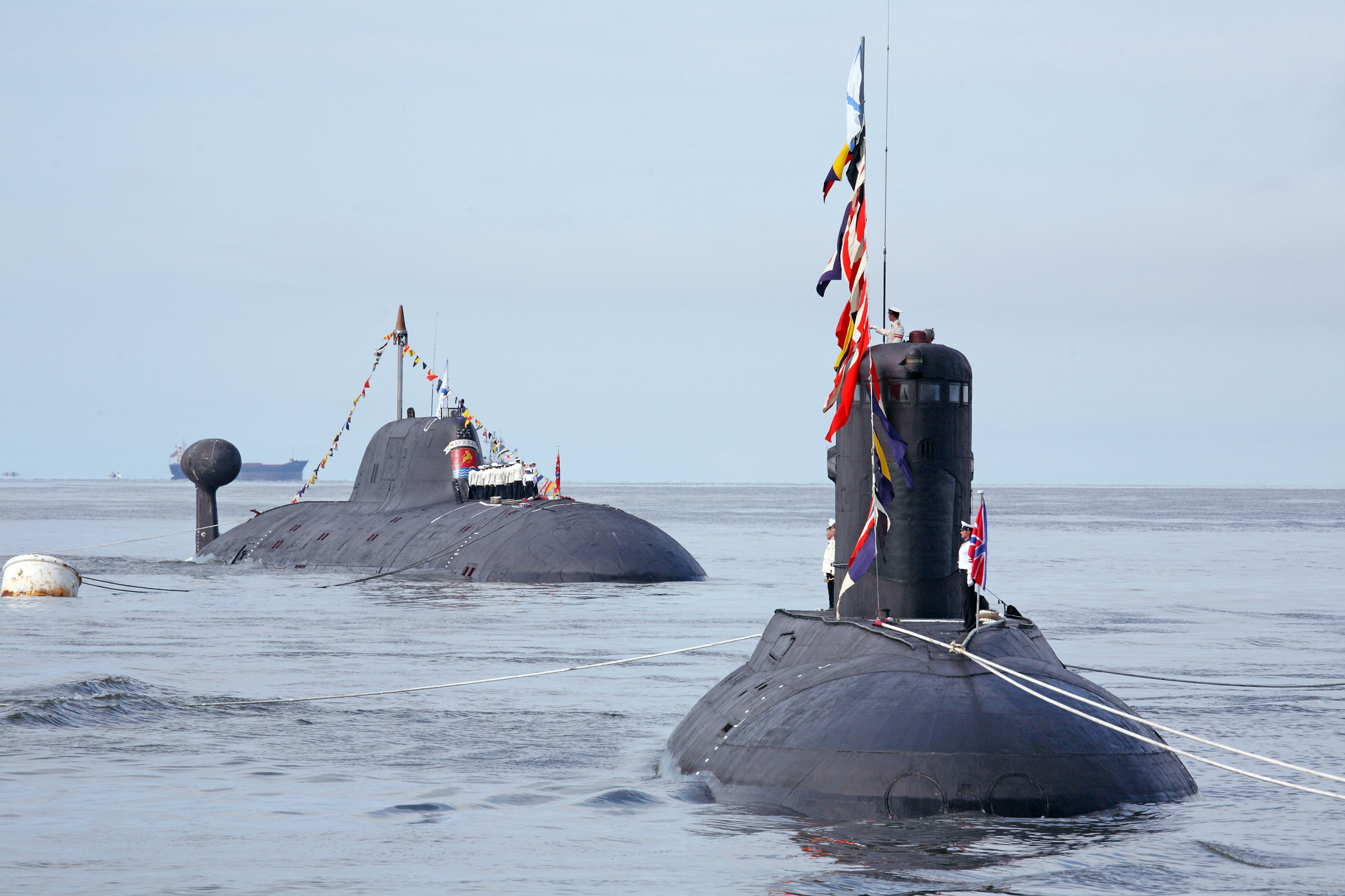 Парад кораблей на день ВМФ 2009 года, Владивосток